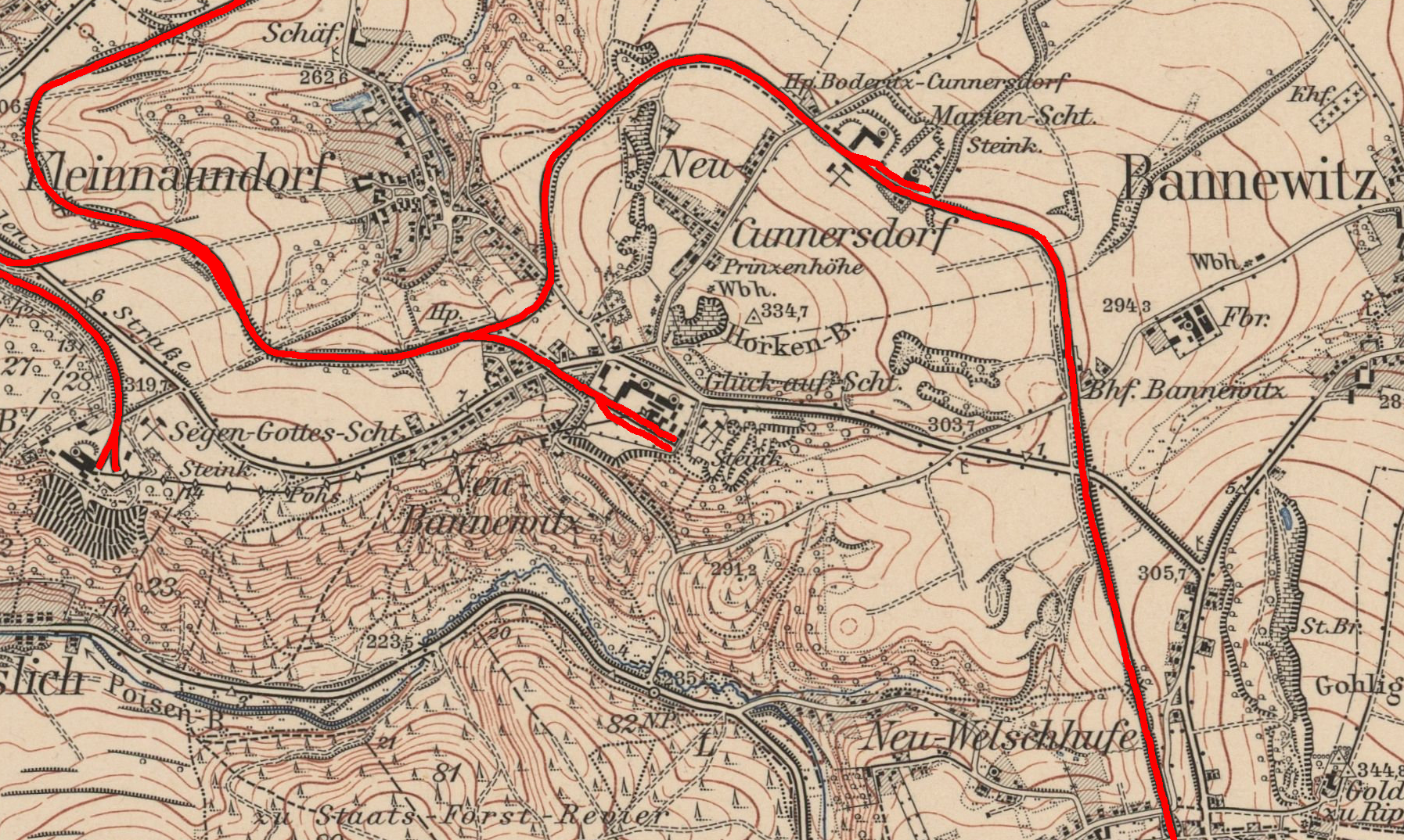 Topographische Karte (Messtischblätter) Sachsen, Ausschnitt Kreischa Blatt 82,1:25000,1913, 1912, Kohlebahn in Bannewitz.